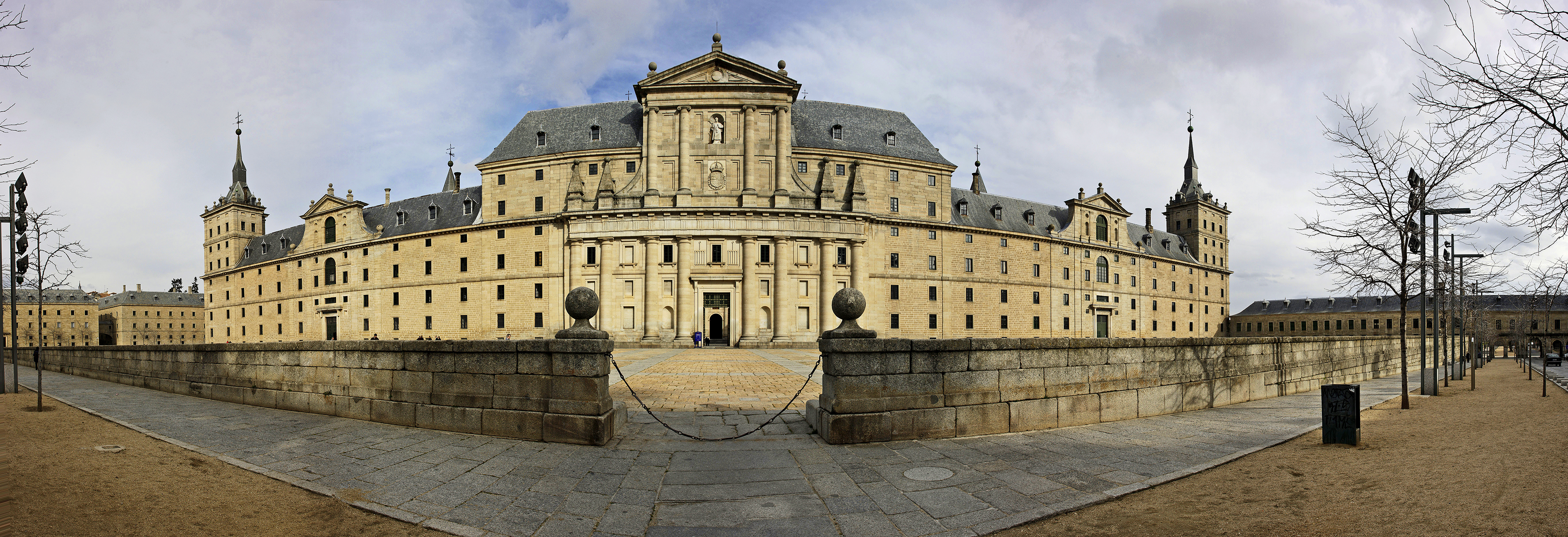 El Escorial, San Lorenzo del Escorial en la Comunidad de Madrid